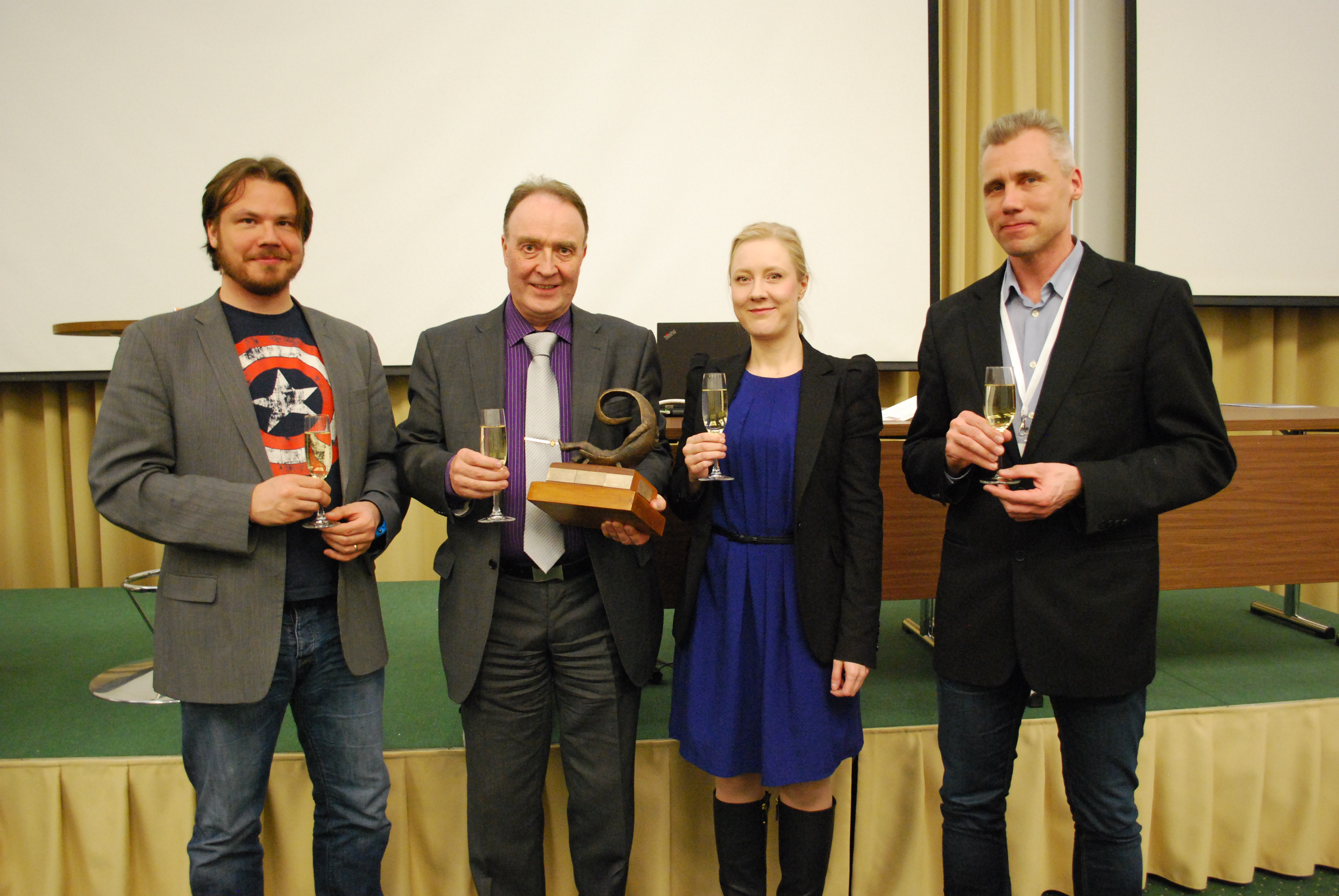 Kuvassa vasemmalta: pääraadin puheenjohtaja Lauri Järvilehto, voittajan edustajat Juha Telkkinen & Anu Guttorm, eOppimiskeskuksen hallituksen puheenjohtaja Ville Venäläinen. Lisätietoja: Kuvaaja: Niina Kesämaa